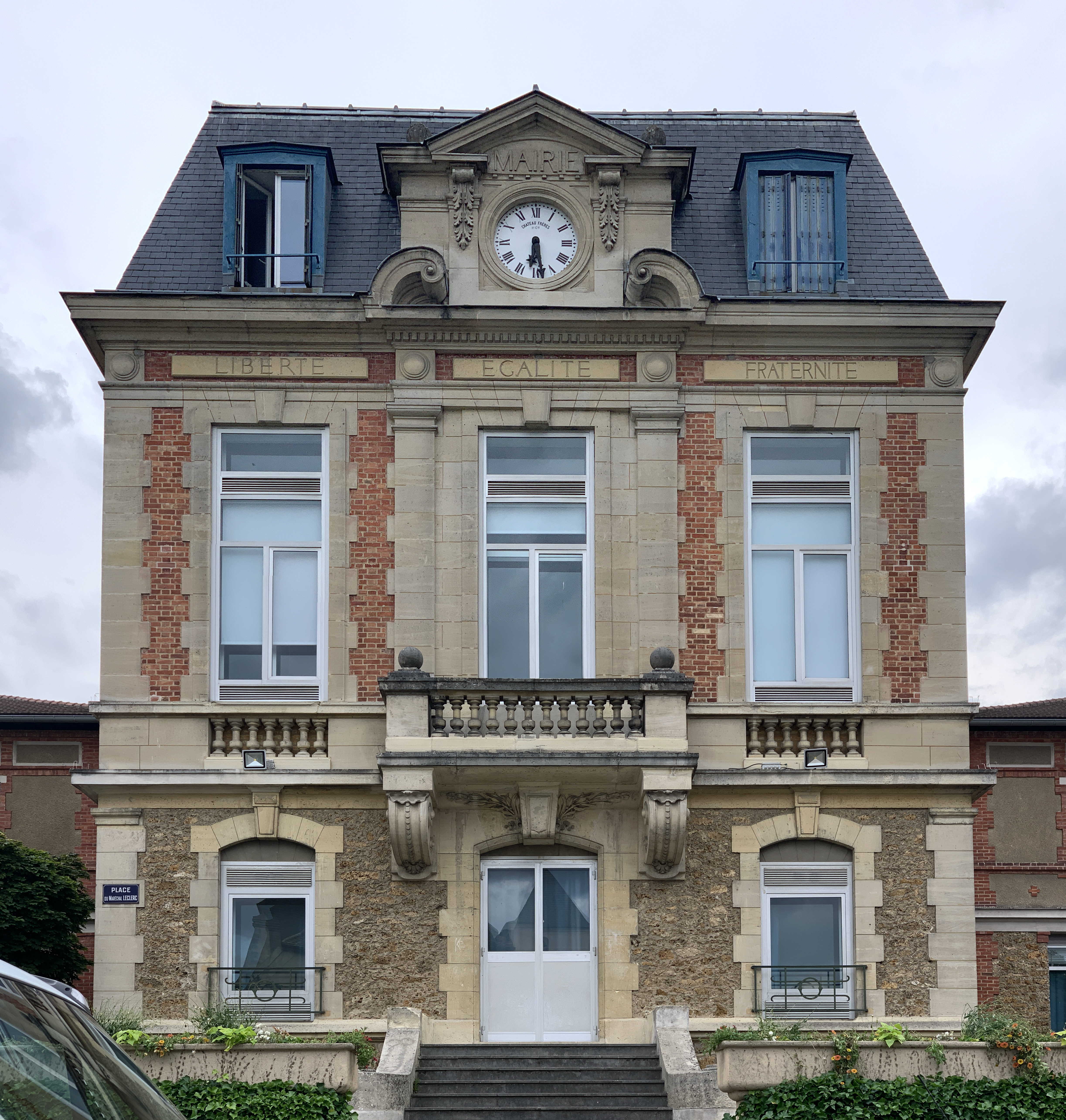 Ancien mairie d'Orly.